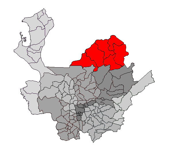 Ubicación de la región del Bajo Cauca en el departamento de Antioquia